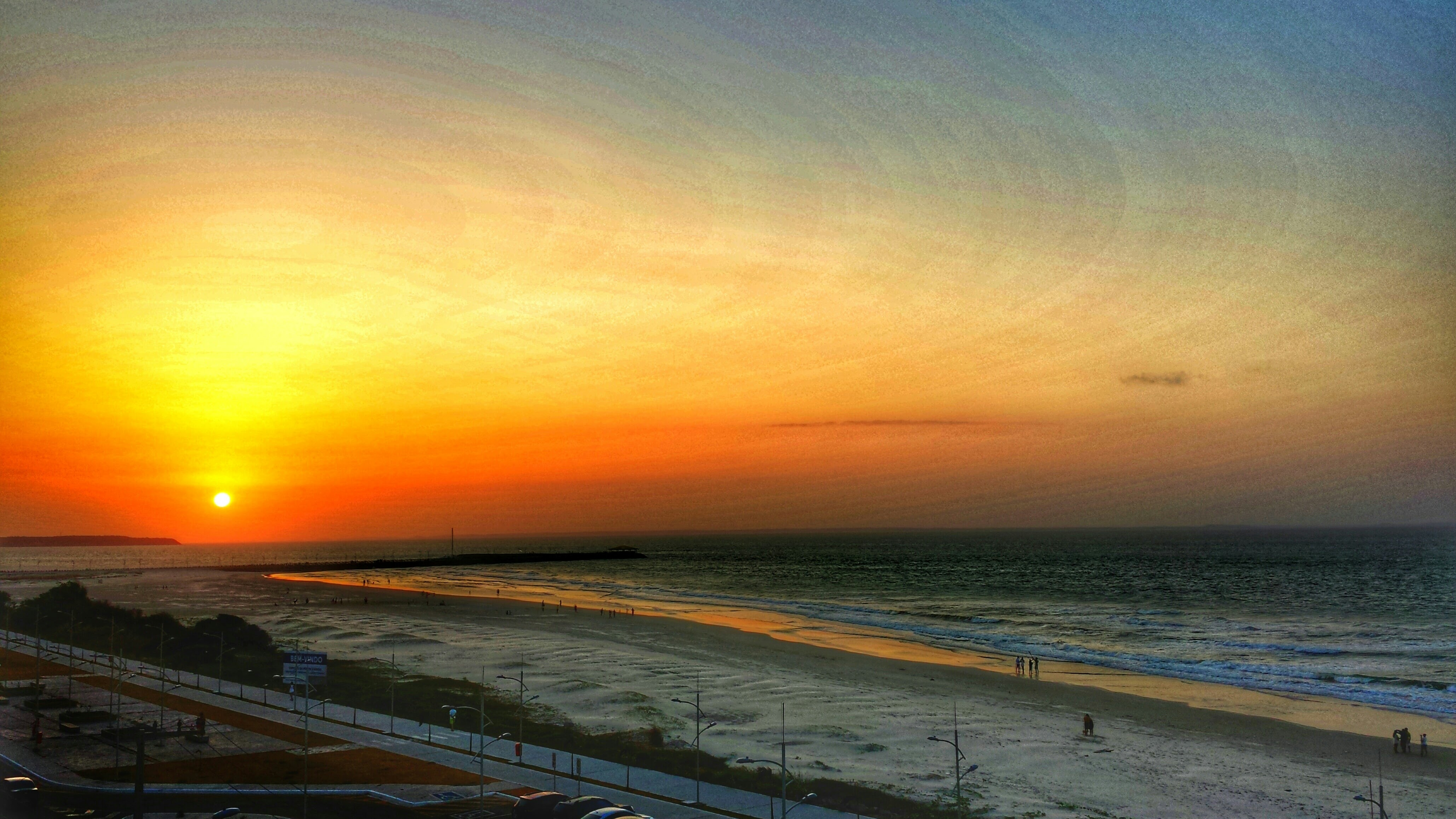 Vista do pôr do sol no espigão à partir do 3° andar de um prédio próximo.